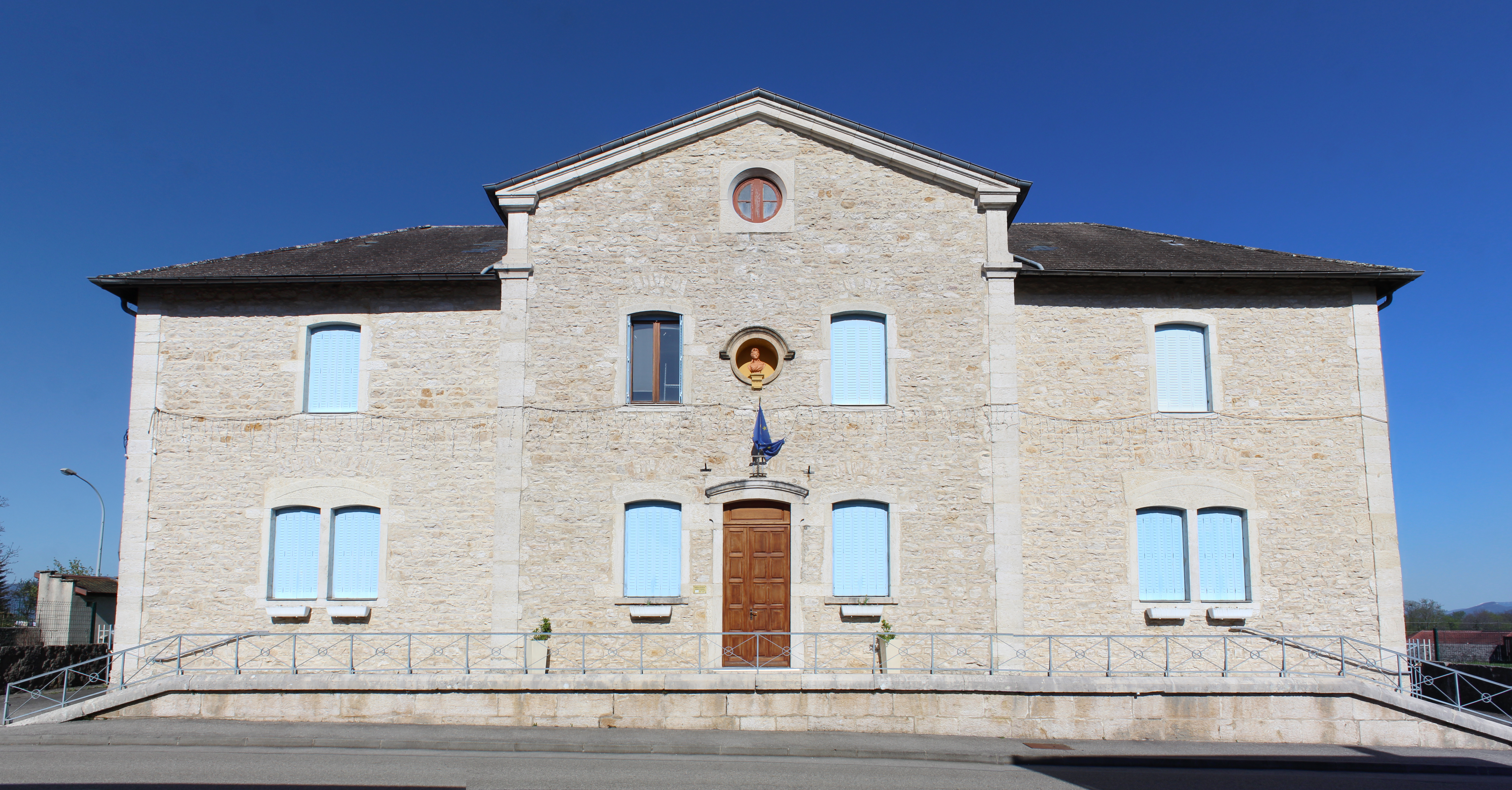 Mairie de Contrevoz.